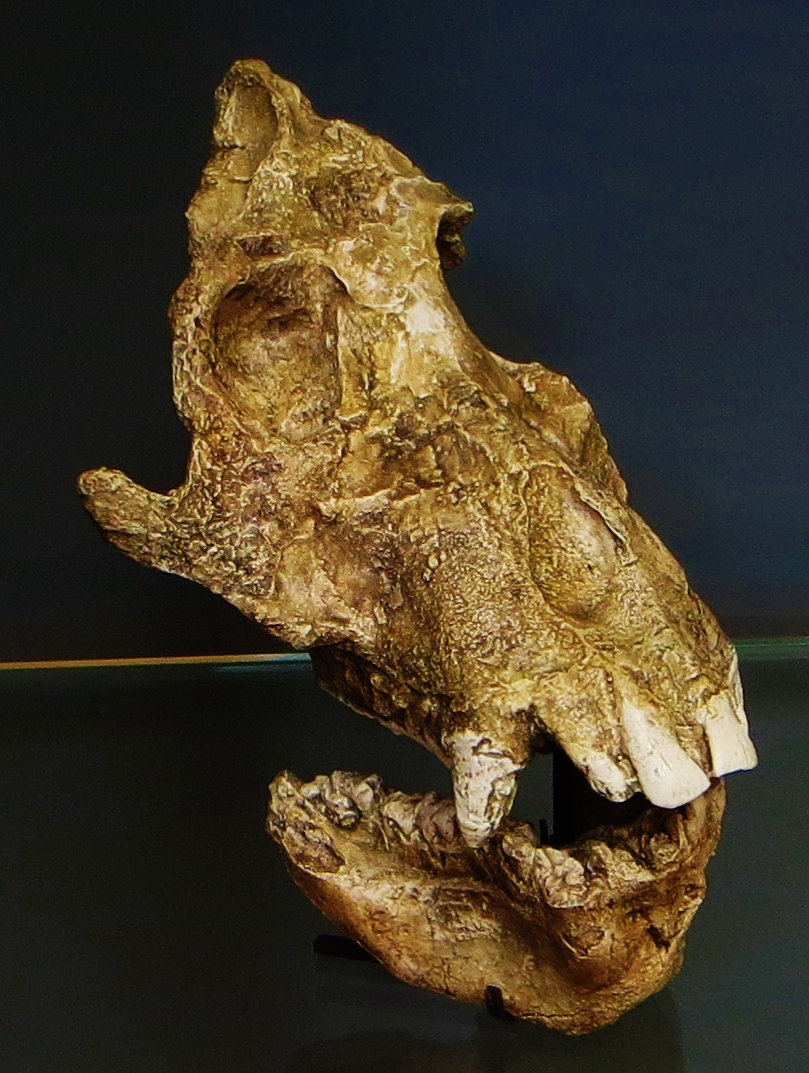 Fossil of Afropithecus, an extinct mammal - Took the photo at Museum Histoire Naturelle, Paris